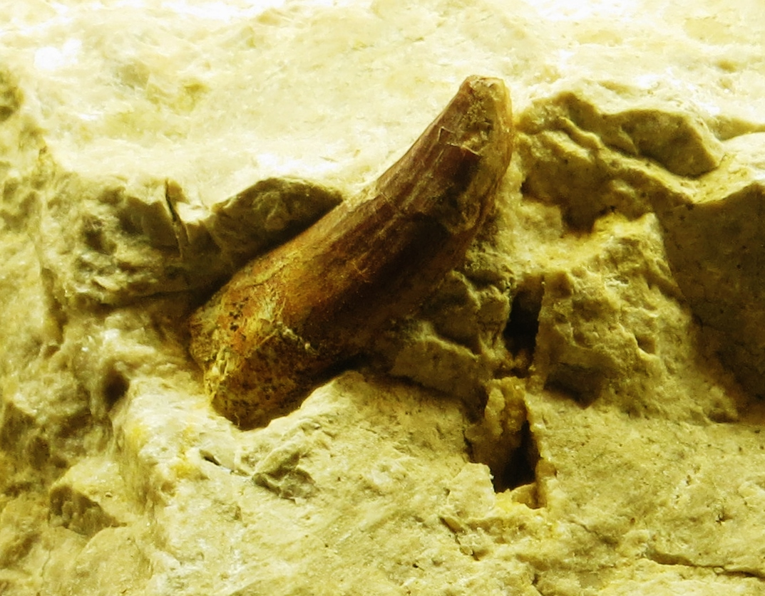 Fossil of Helveticosaurus, an extinct reptile- Took the picture at Museo di Storia naturale “Antonio Stoppani” - Venegono Inferiore